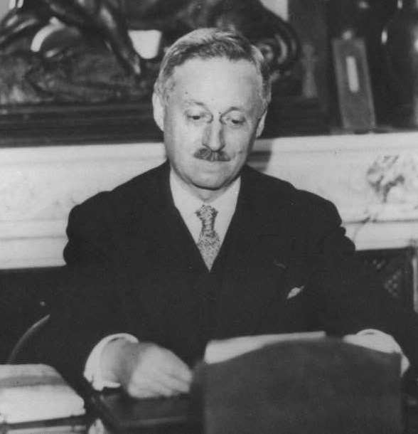 Victor Pierre LE GORGEU chez lui dans on bureau